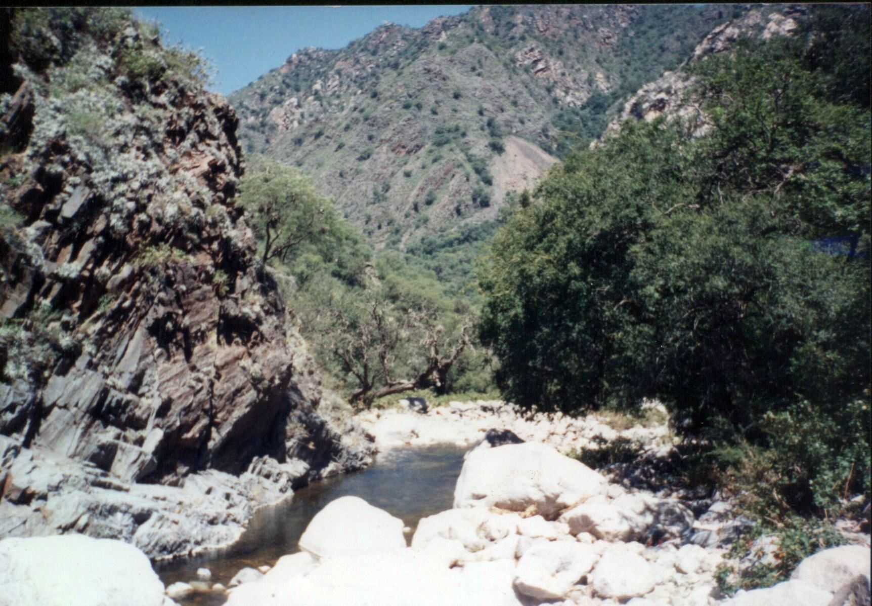 Quebrada del Vallecito, en Olta, La Rioja